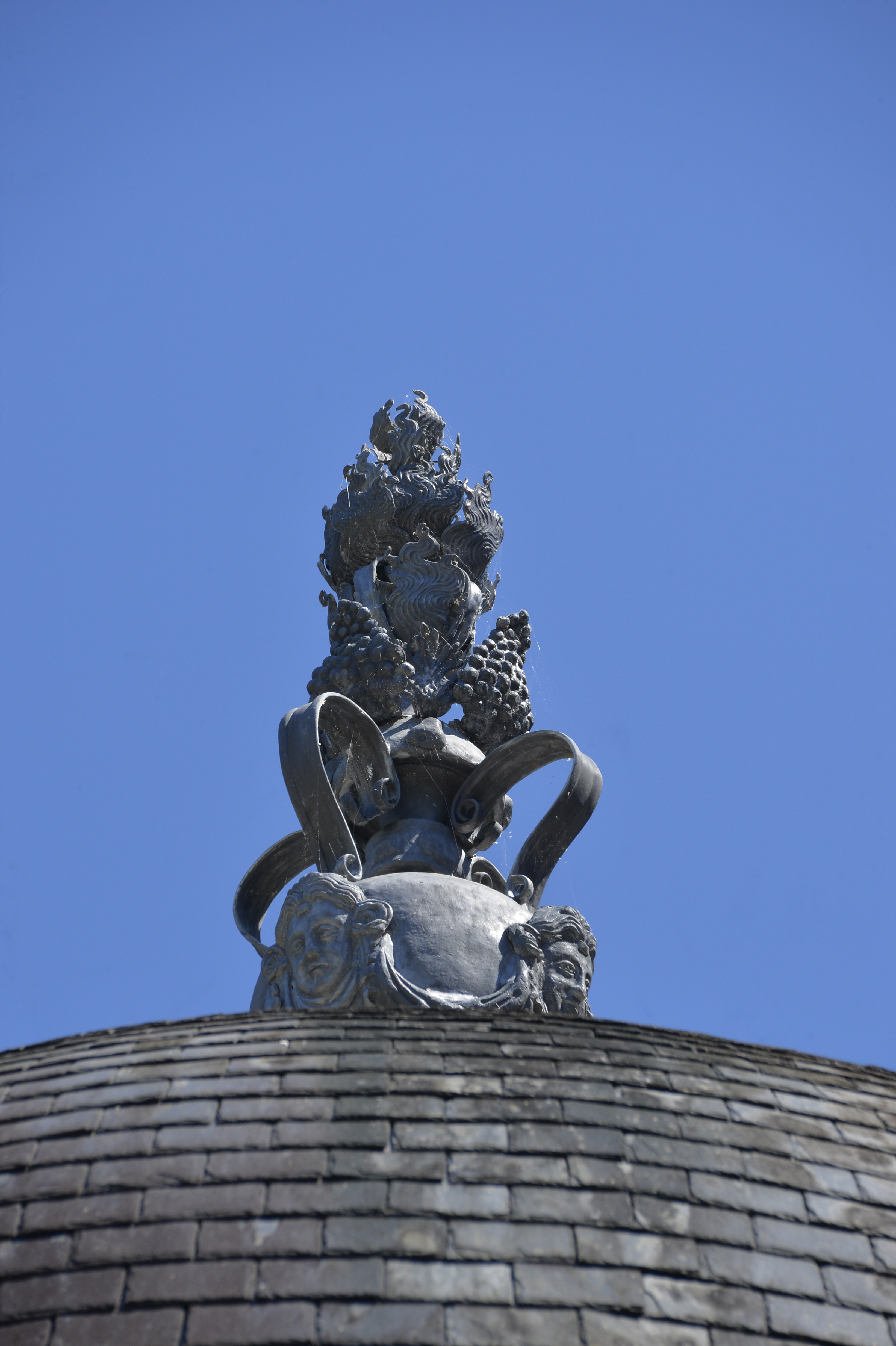 Centre du château renaissance d'Acquigny